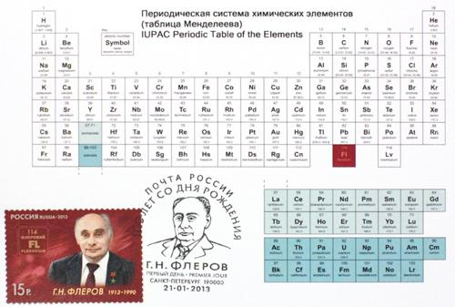 Картмаксимум к 100-летию со дня рождения Георгия Николаевича Флёрова. На почтовой марке изображен портрет Г.Н. Флёрова и 114-й элемент периодической системы химических элементов (таблицы Менделеева), названный флёровием в честь учёного. Спецгашение № 2013/4-ш. 100 лет со дня рождения Г.Н.Флерова. Санкт-Петербург.